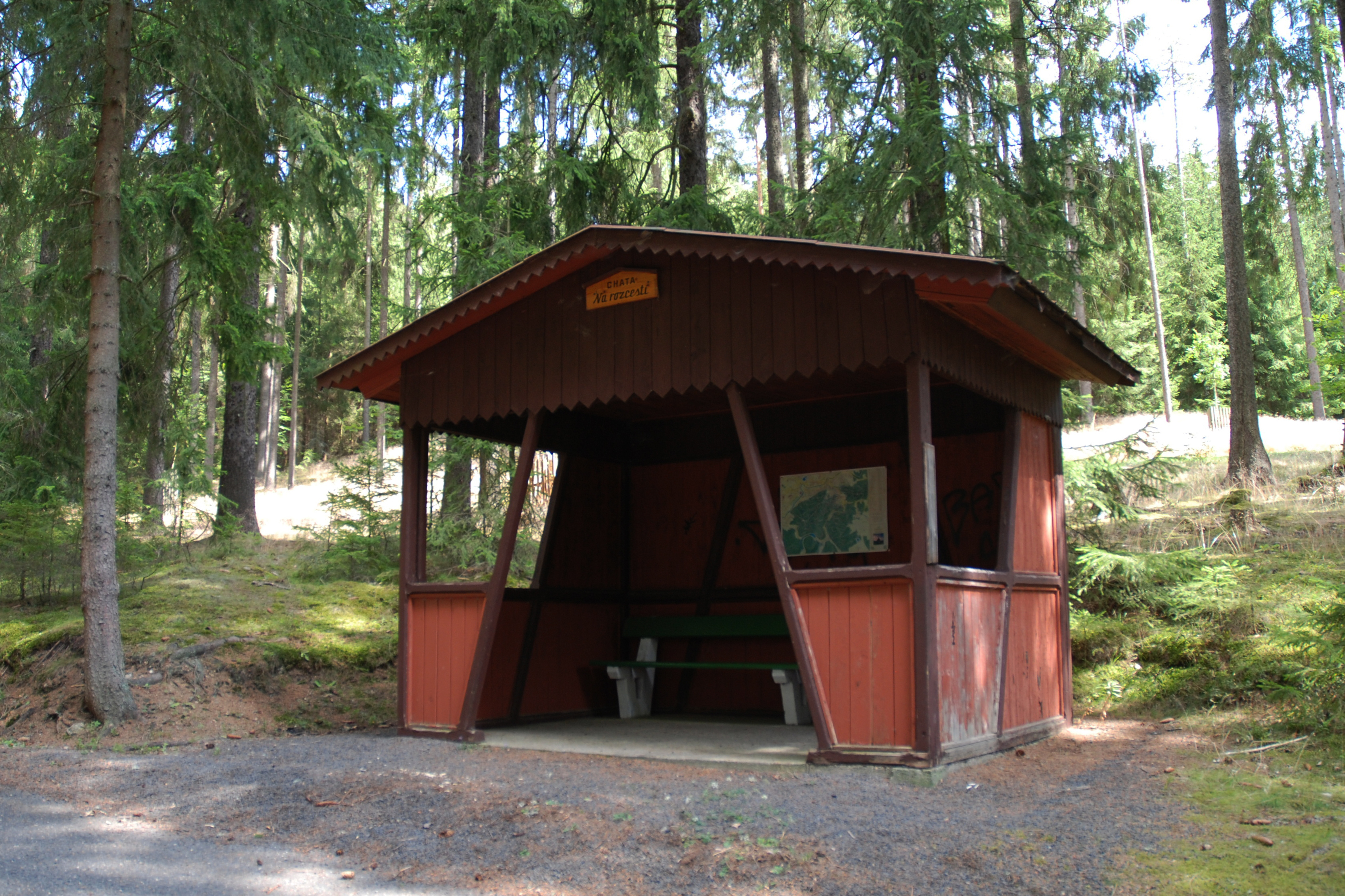 Chata Na Rozcestí u Okružní cesty v karlovarských lázeňských lesích